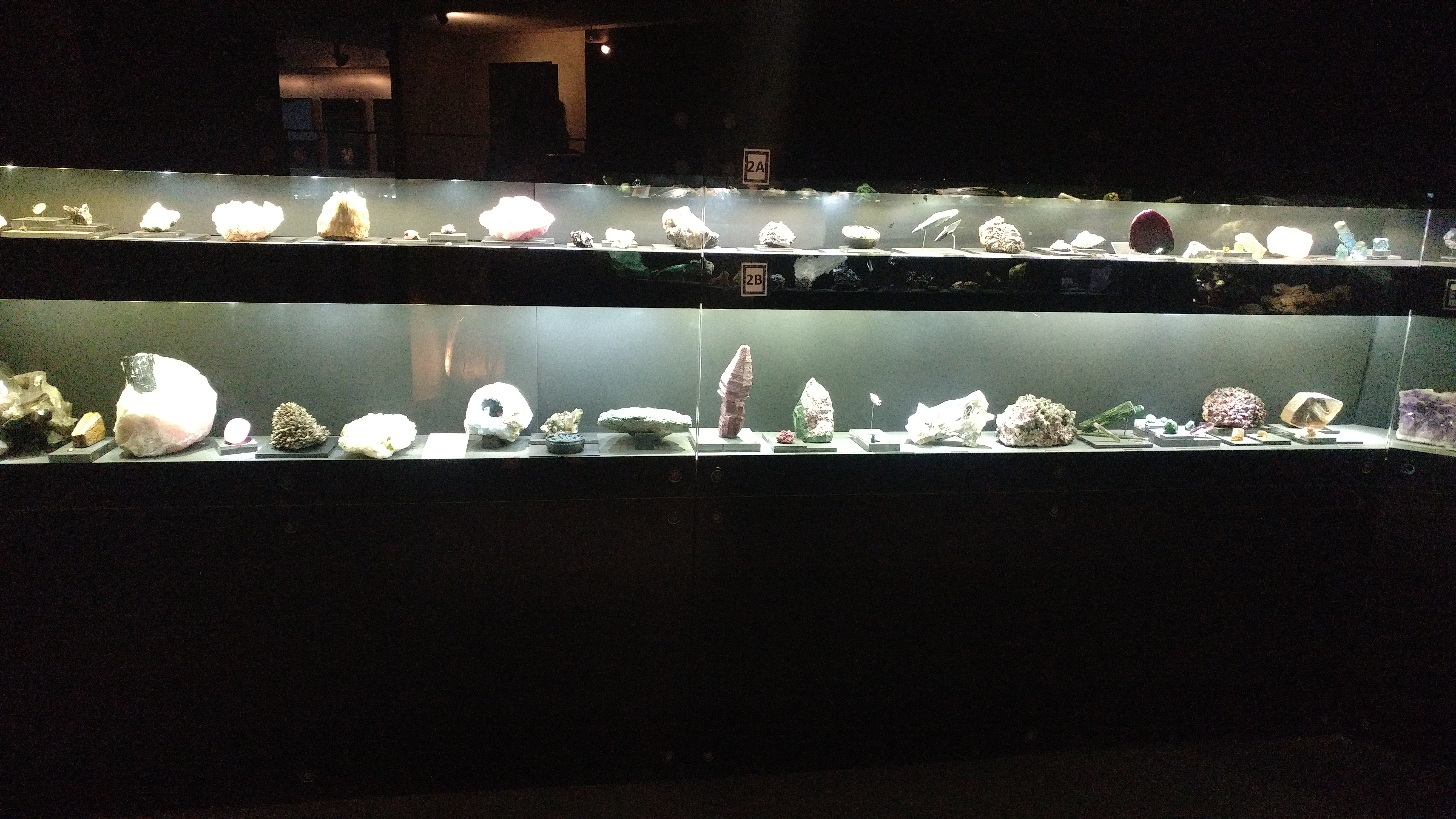 אוסף הראל לאבני חן ומינרלים